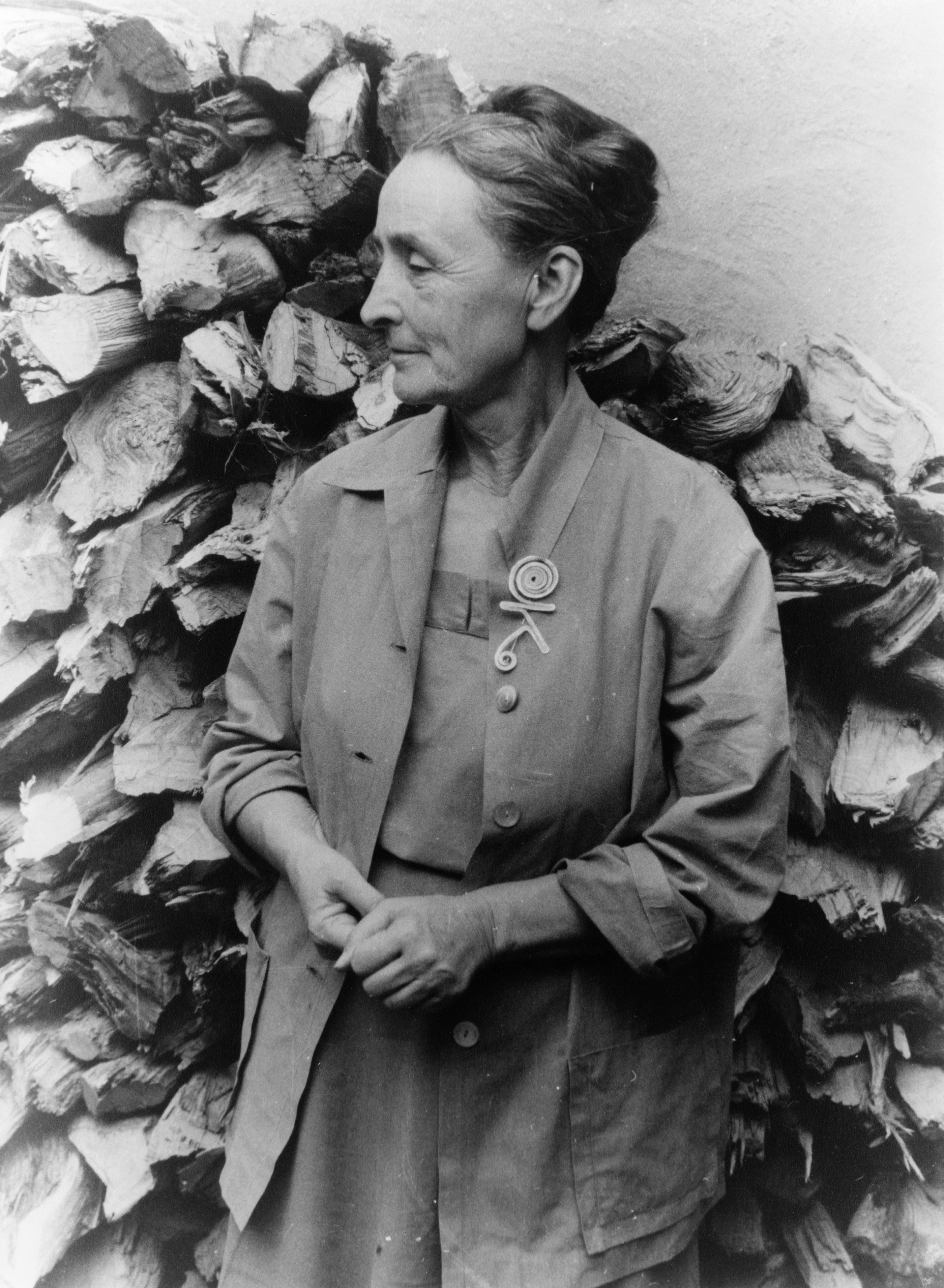 Georgia O'Keeffe, 16 August 1950